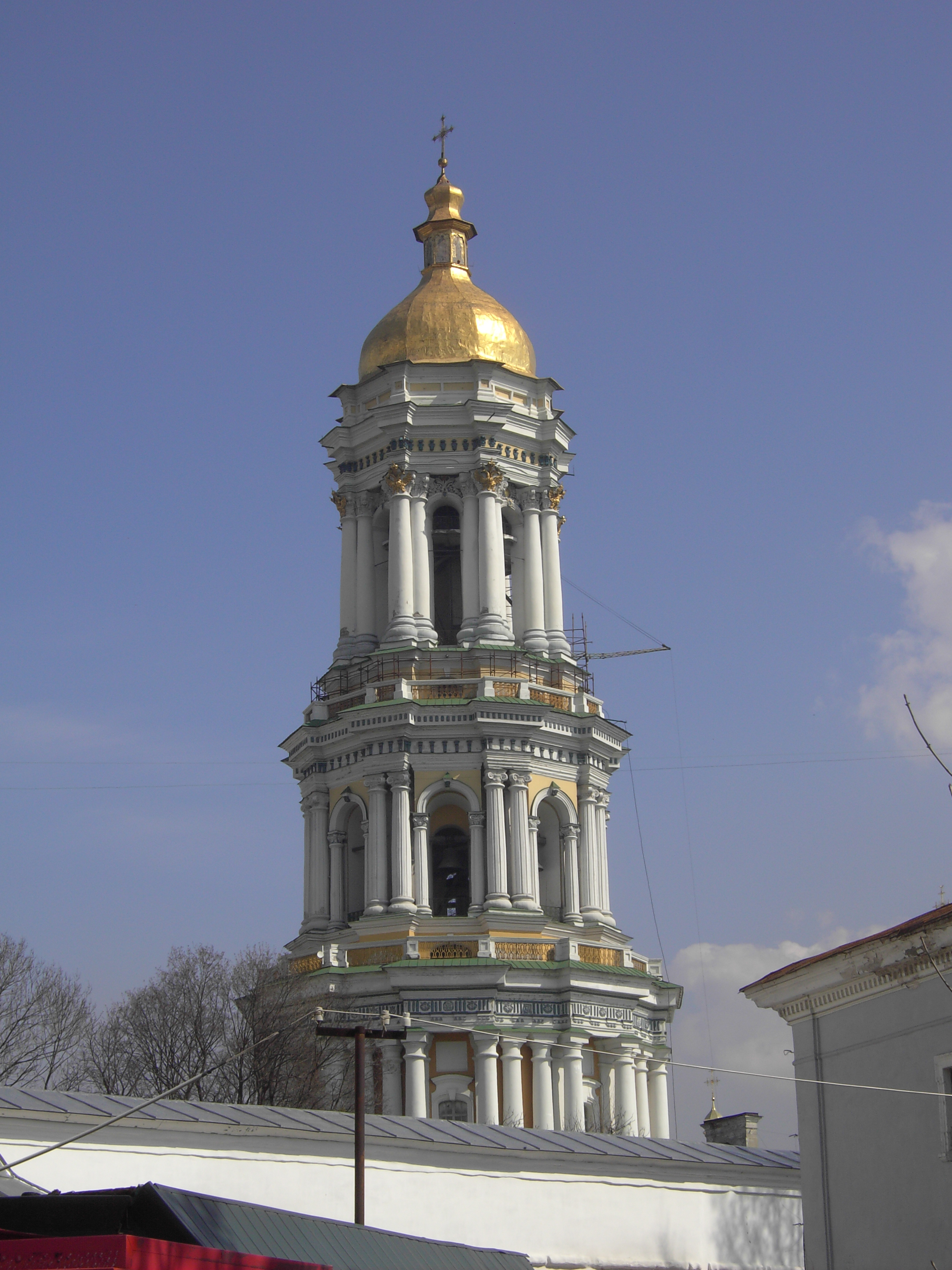 Turm des Höhlenklosters in Kiew UA